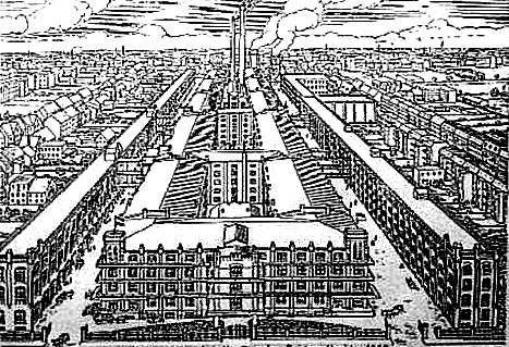 Kakao Compagnie Theodor Reichardt in der Neumann-Reichardt-Straße 29-33 in Wandsbek. Das Gebäude wurde 1905 nach Plänen von Valentin Schmidt erbaut. Heute befindet sich dort ein Gewerbehof.